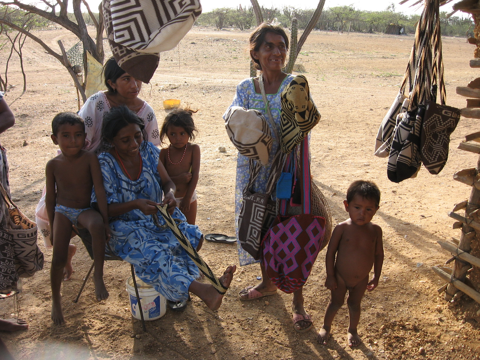 Familia Wuayúu del desierto de la Guajira en Colombia